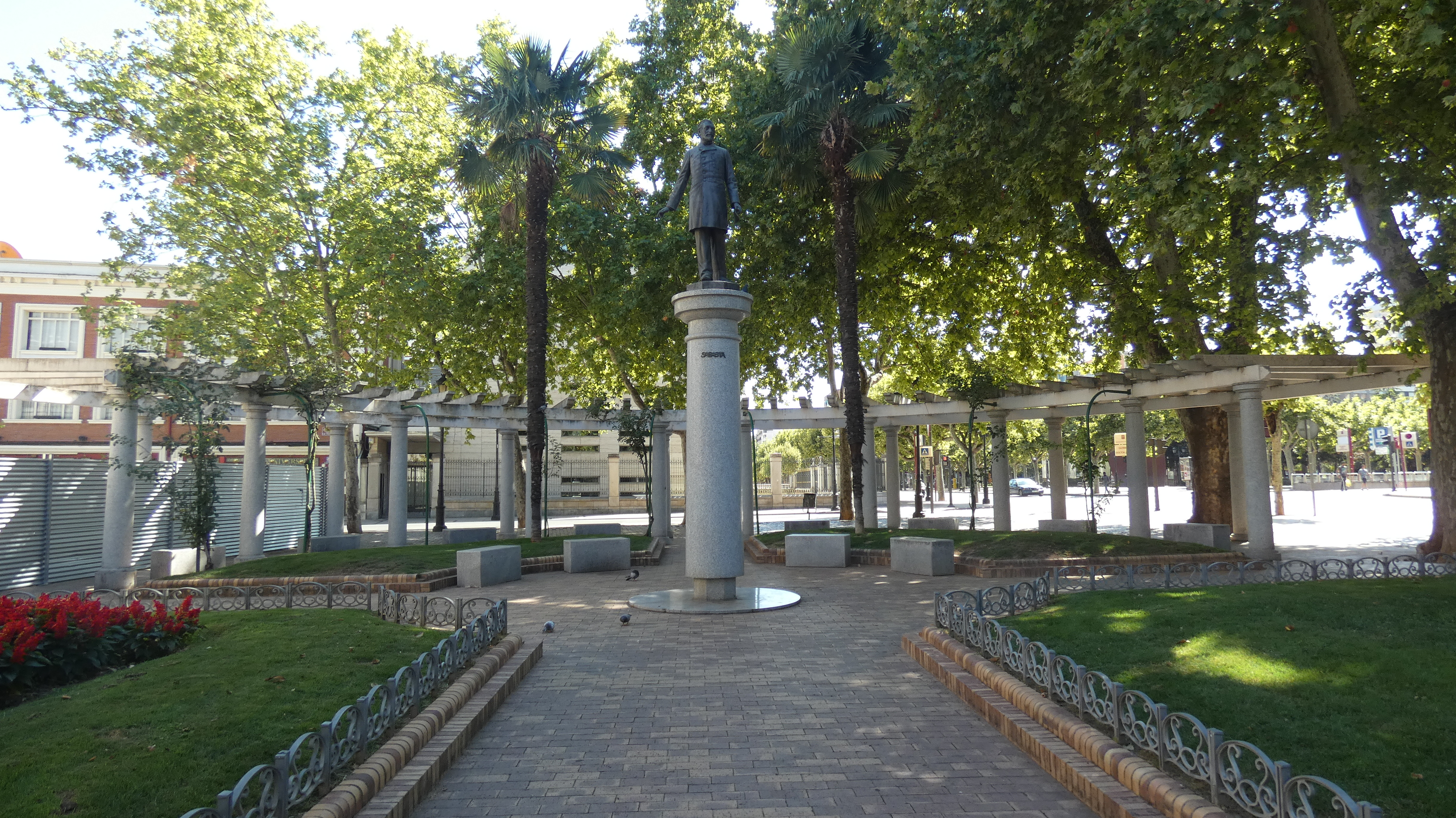 Monumento a Sagasta de Logroño